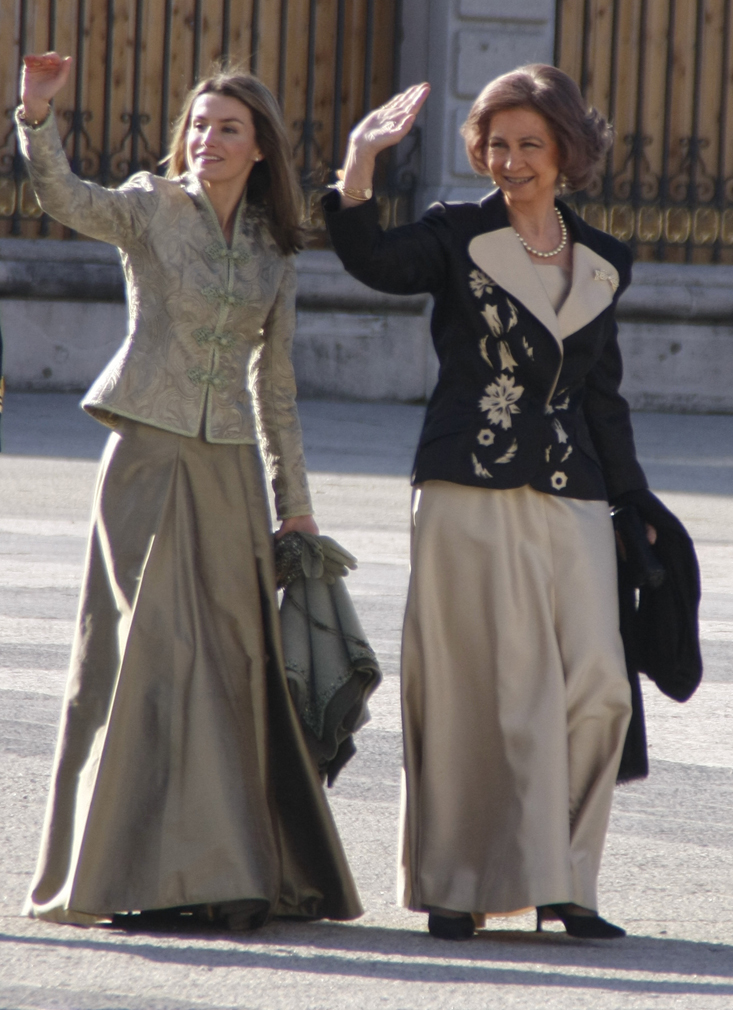 La reina Sofía y la princesa Letizia en la Pascua Militar de 2009, en la Plaza de la Armería del Palacio Real de Madrid.